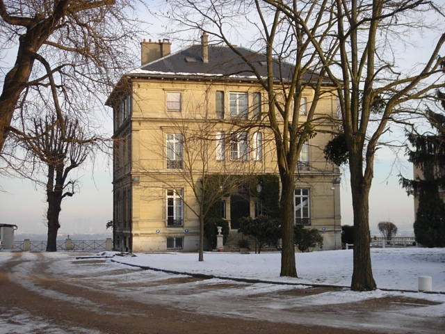 Ancienne maison de la famille Reinach à Saint-Germain-en-Laye, aujourd'hui Lycée Saint-Érembert.